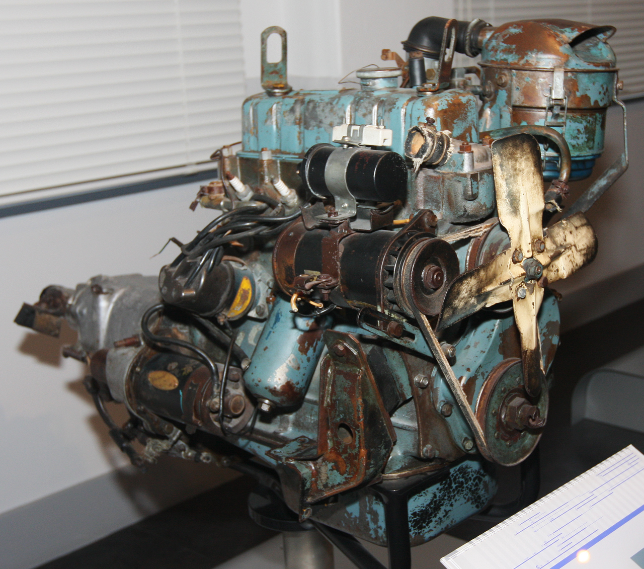 1957 Nissan Model C engine (#06424). L4 988cc